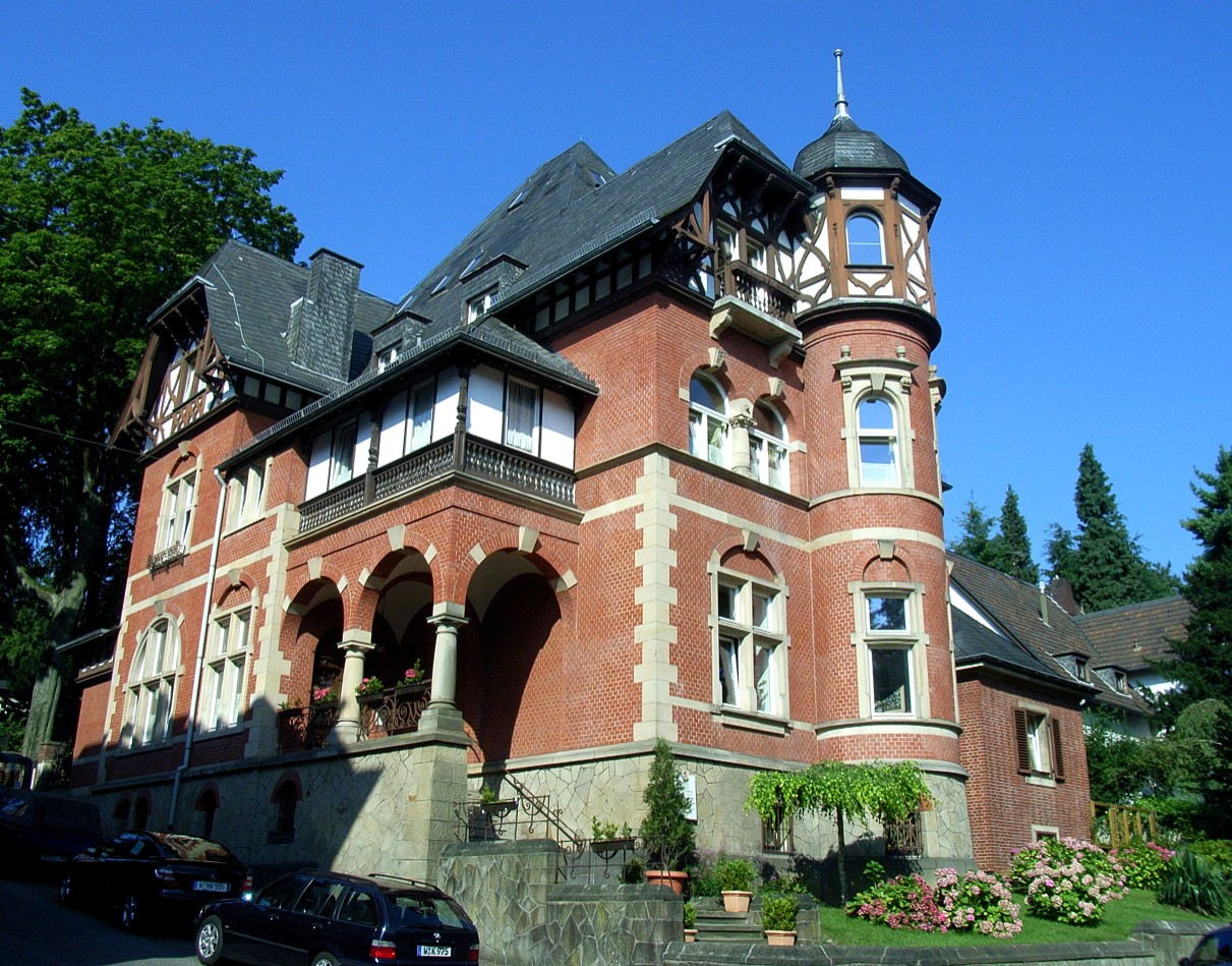 Villa Julie Bayer in Wuppertal-Elberfeld, Platzhoffstraße 25 / Franseckystraße; erbaut 1895-1896; unter Denkmalschutz